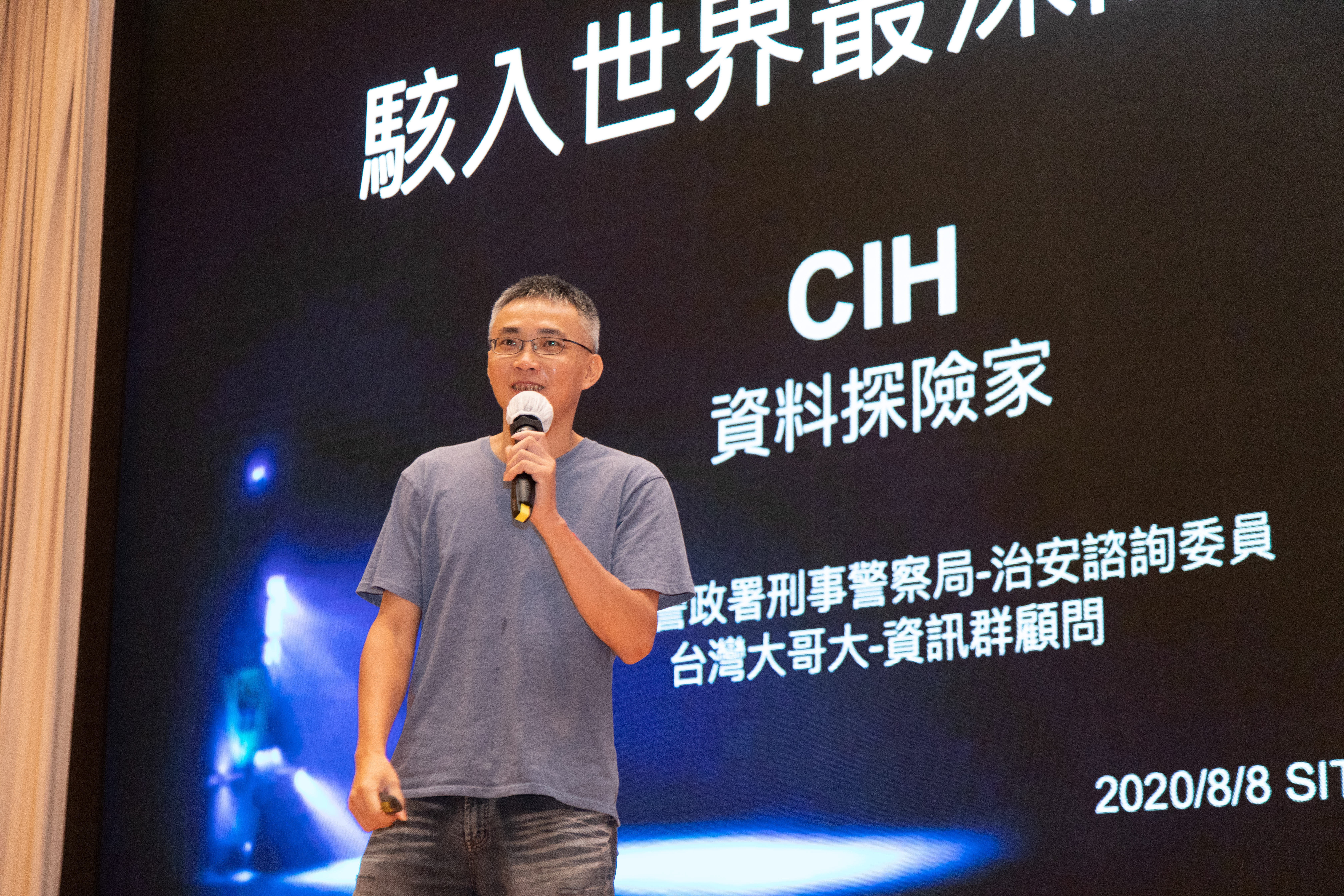 臺灣資安科學家陳盈豪（CIH）於 2020 年學生計算機年會演講，2020 年 8 月 8 日攝於中央研究院人文及社會科學館國際會議廳。原 Flickr 標題為《丞相-1285》。